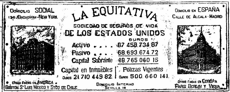 La Equitativa sociedad de seguros de vida de los Estados Unidos - domicilia en Espana calle de Alcala Madrid.